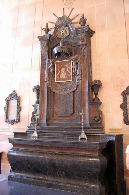 Нясвіжскі замак. Алтар капліцы.